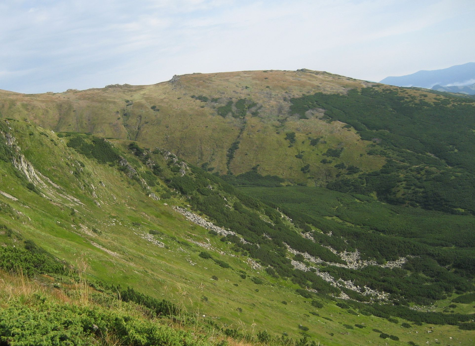 Shpyci-1.jpg: гора Шпиці (Верховинський район)